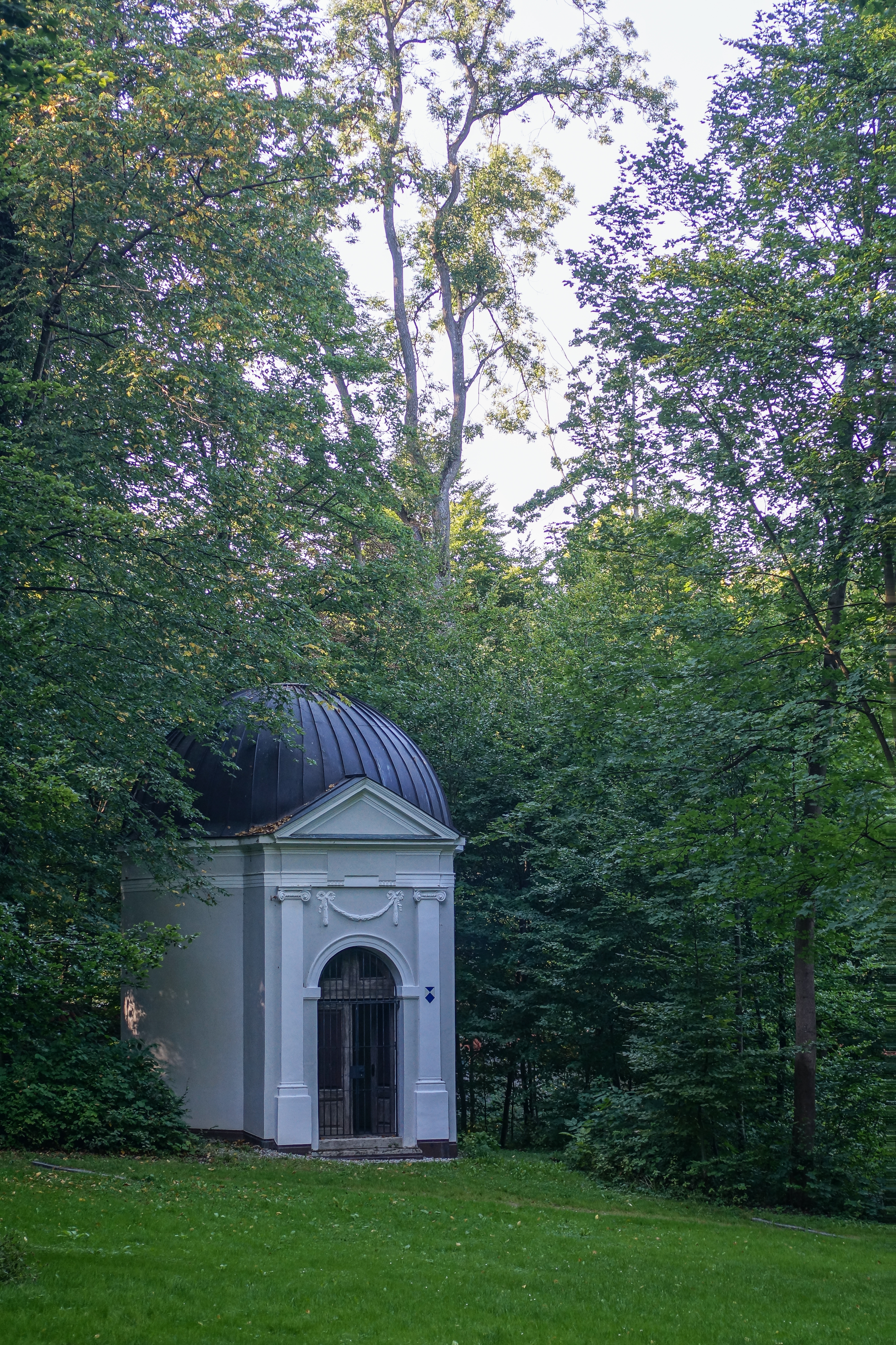 Freundschaftstempel im Herzogsgarten genannten Teil des Landshuter Hofgartens This is a photograph of an architectural monument.